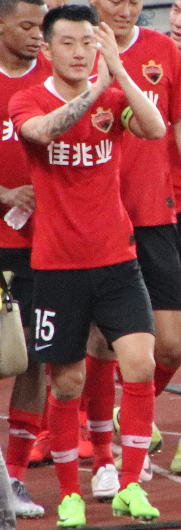 中文（中国大陆）: 深圳佳兆业球员：葛振